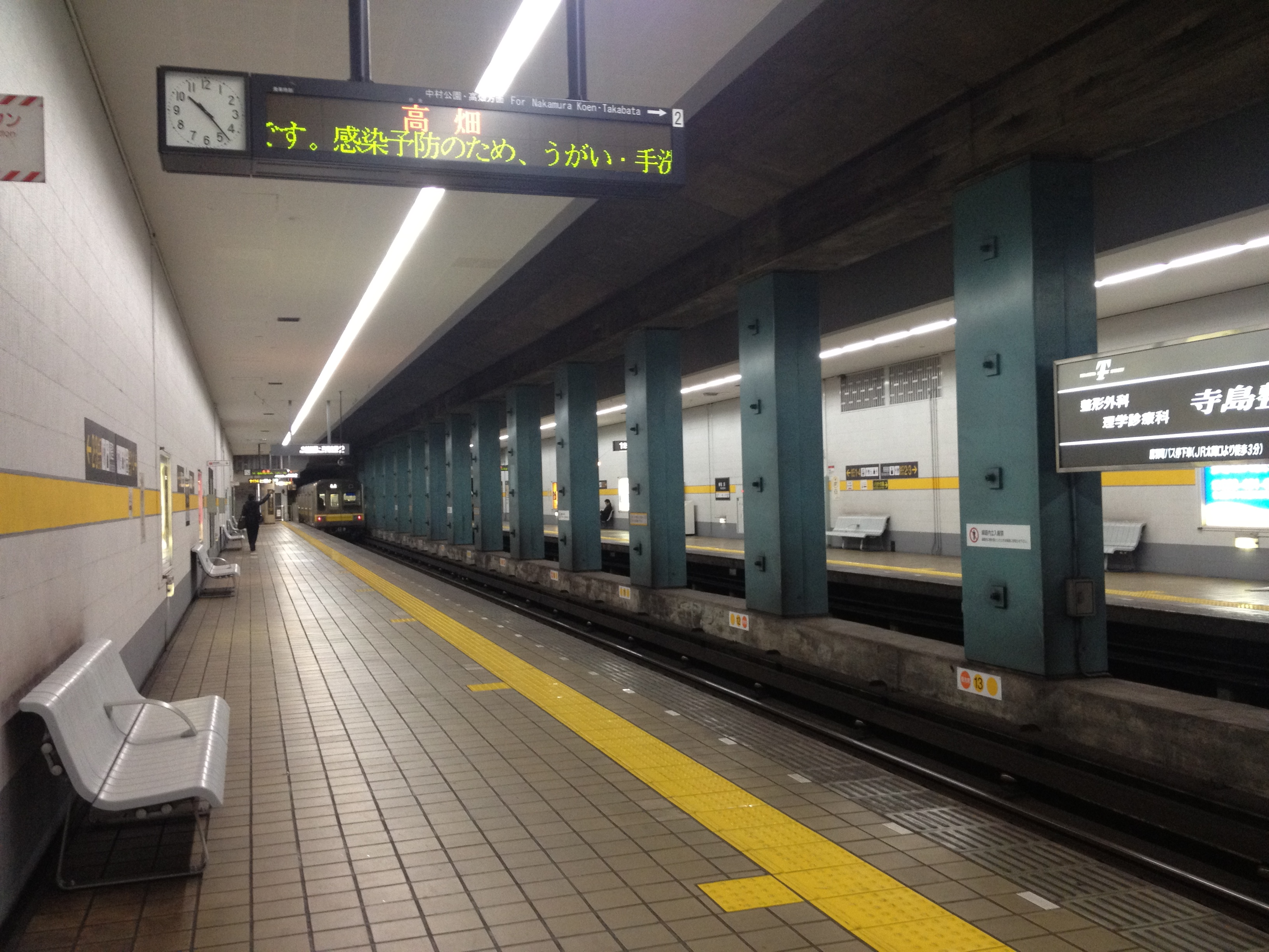 名古屋市営地下鉄亀島駅 2番のりば